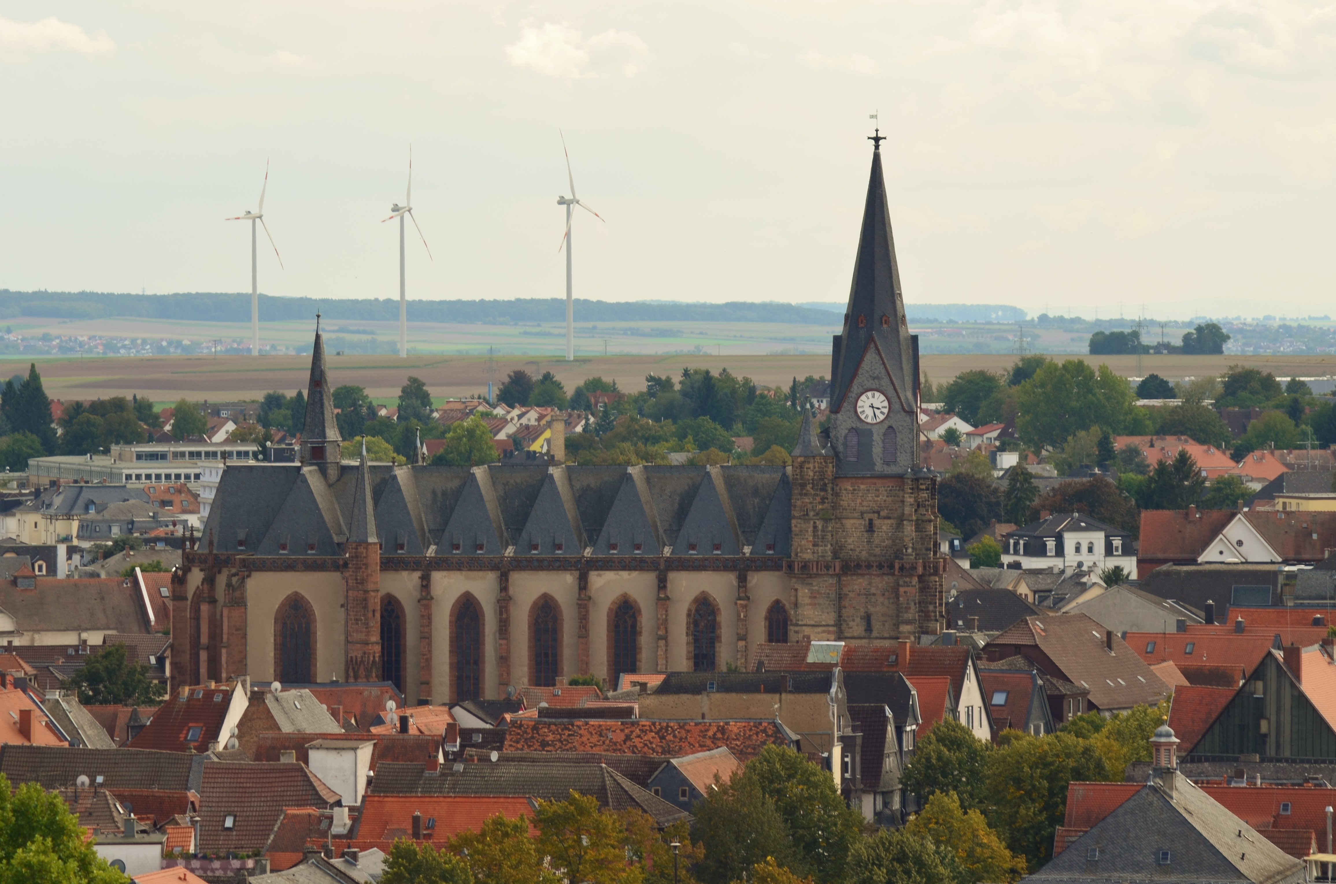 Friedberger Stadtkirche "Unserer Lieben Frau" fotografiert vom Adolfsturm in der Burganlage Friedberg